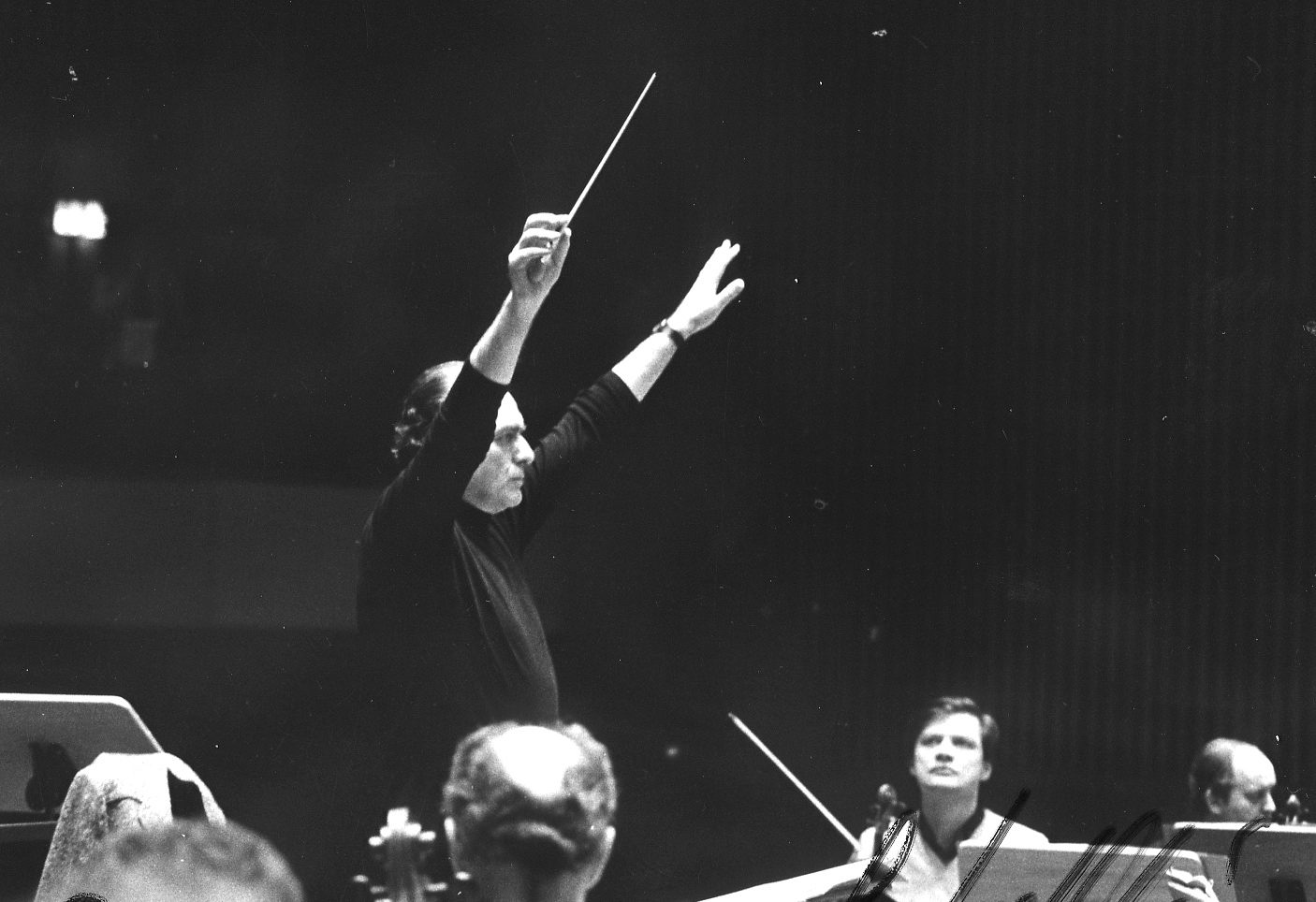 Masini - Beethoven Halle, Bonn